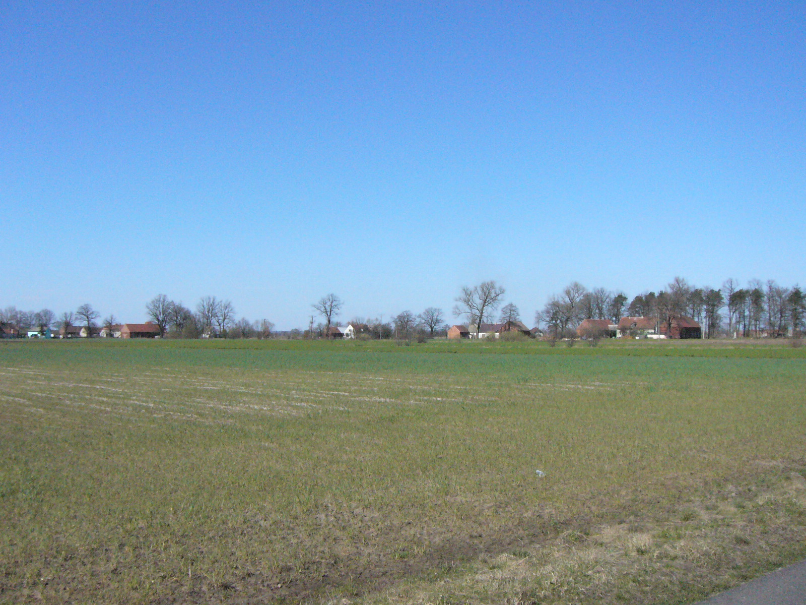 Nowa Kuźnia, wieś w powiecie polkowickim, woj dolnośląskie.